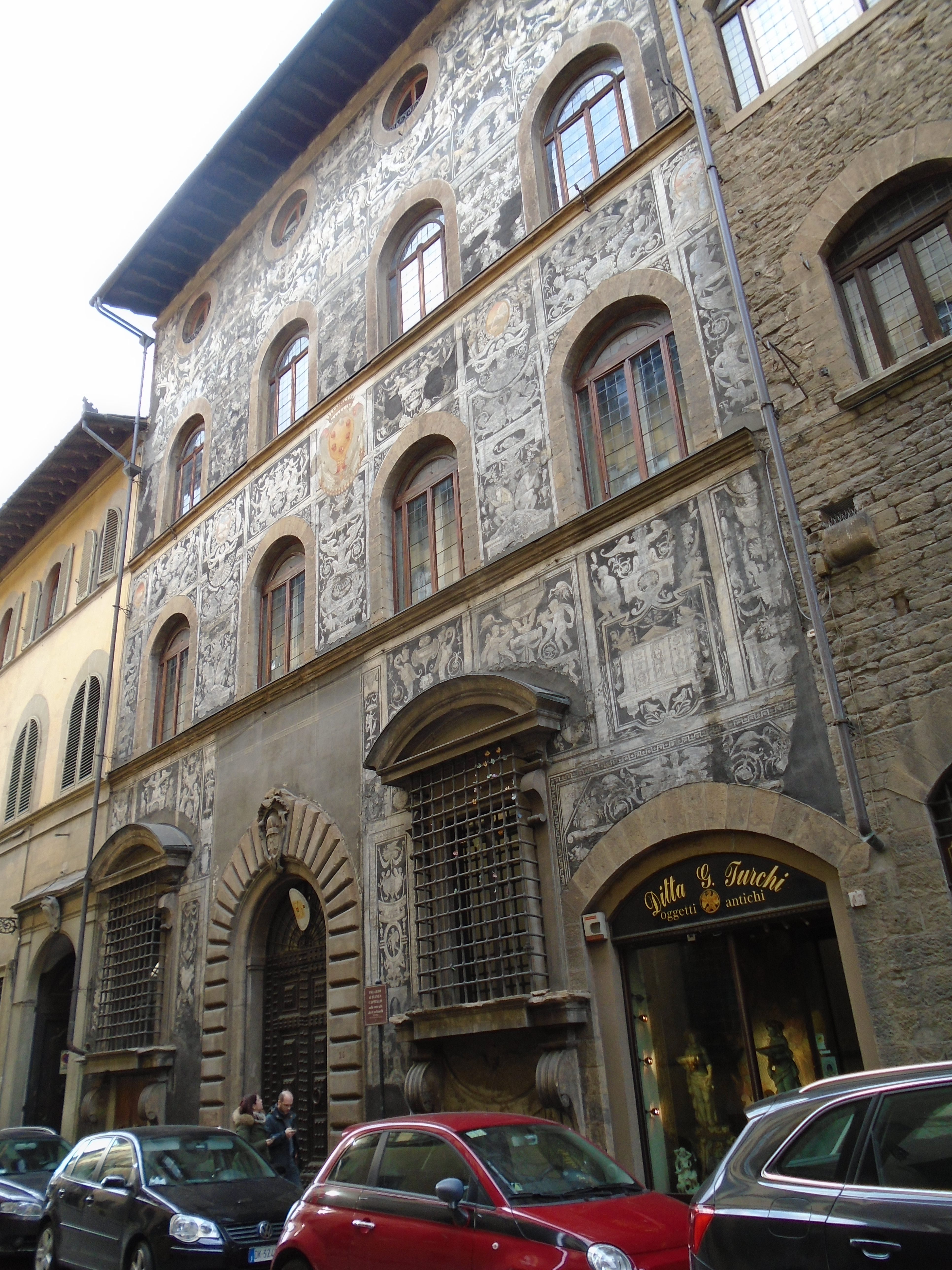 Florence servitiu